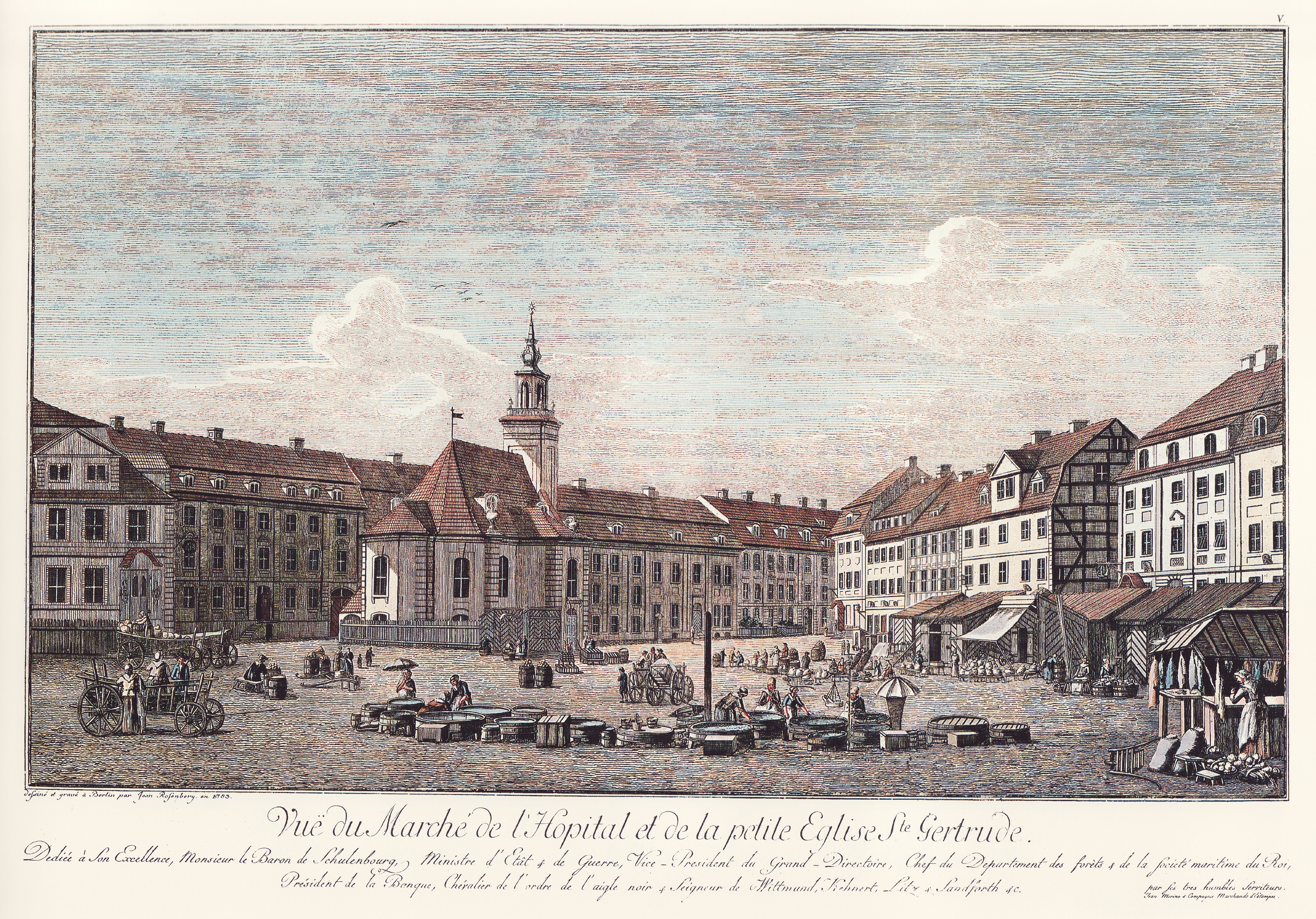 Ansicht des Spittelmarktes mit der Gertraudenkirche, Alt-Berlin/Deutschland